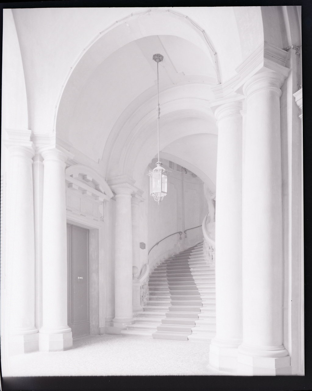 Servizio fotografico : Bologna, 1968 / Paolo Monti. - Buste: 4, Fototipi: 4 : Negativo b/n, gelatina bromuro d'argento/ pellicola ; 10x12. - ((Serie costituita da 4 negativi identificati con i nn.: 14590-14593. La suddetta serie è contenuta nella scatola identificata con la numerazione 14001-14500G. - Occasione: Documentazione per la pubblicazione: Anna Maria MATTEUCCI, Carlo Francesco Dotti e l'architettura bolognese del Settecento, Bologna, Edizioni Alfa, 1968. - Fonte: Monografia di Matteucci, Anna Maria: Carlo Francesco Dotti e l'architettura bolognese del Settecento, Bologna, Edizioni Alfa (1968)